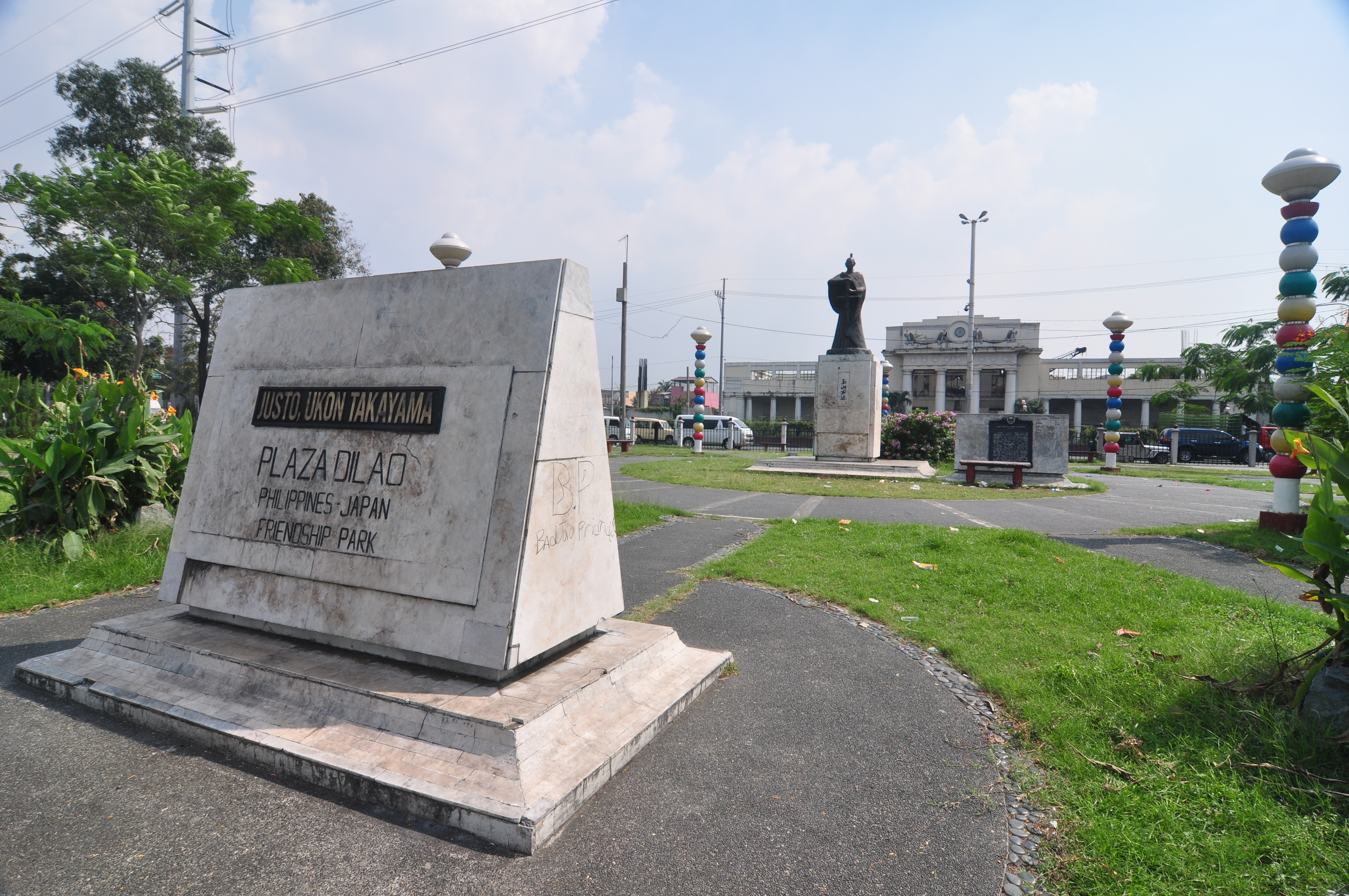 Plaza Dilao in Manila, Philippines